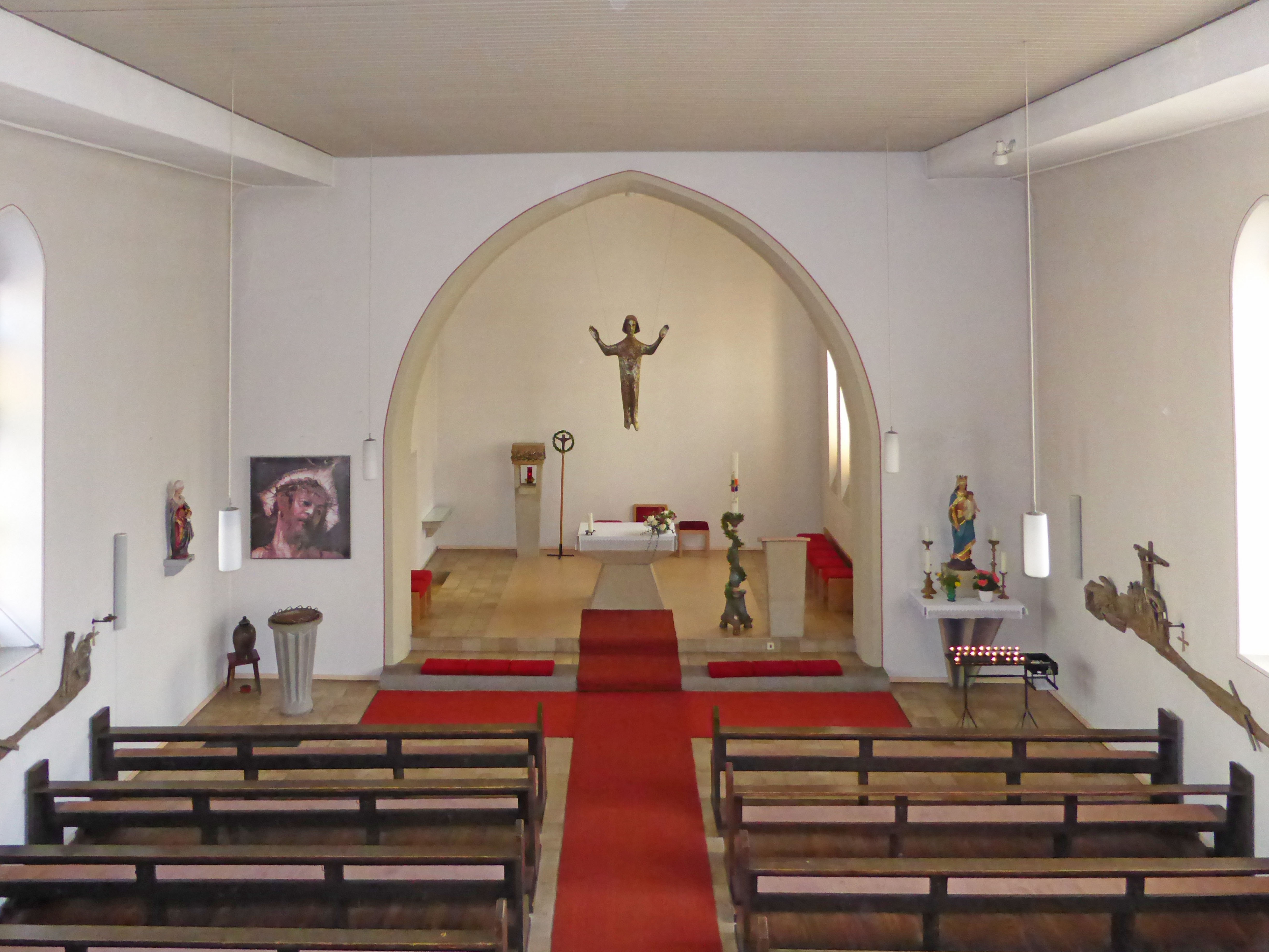 Katholische Kirche in Velpke.